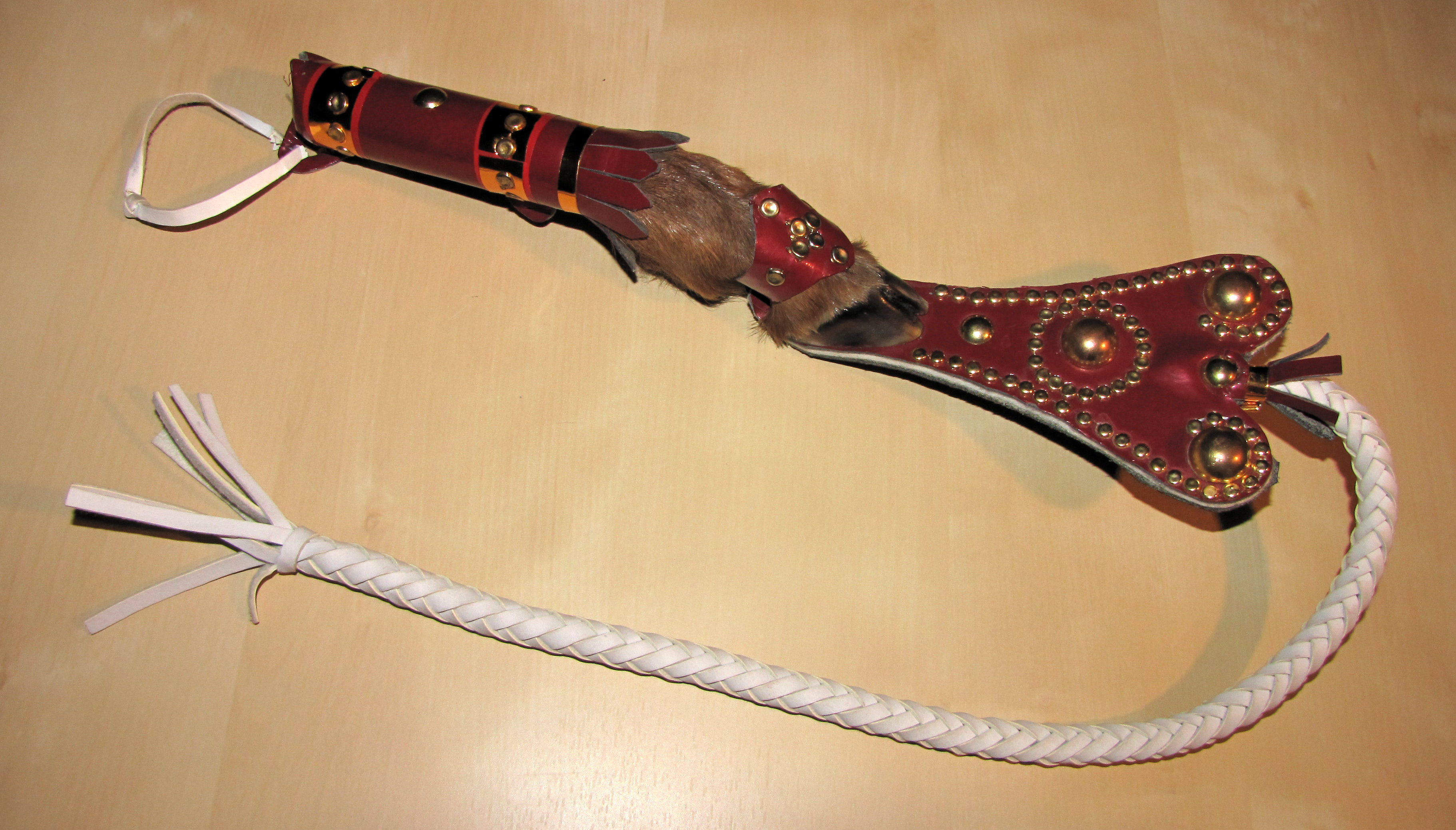 Kamcha cadeau-souvenir du Kazakhstan